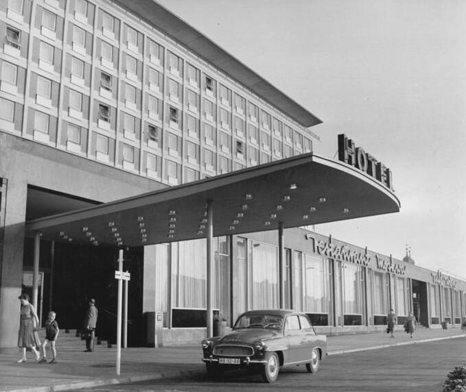 Magdeburg, Hotel "International", Eingang Zentralbild Krueger Qu 5.12.1963 Hotel International in Magdeburg Eines der schönsten und modernsten Hotels der DDR, das Hotel "International" hatte am 27. Juli 1963 72 Tage vorfristig seine Pforten geöffnet. 425 Gästen stehen 361 komfortabel ausgestattete Zimmer zur Verfügung. Im Restaurant "Moskwa" mit 192 Plätzen und im Cafe "Wien" mit 190 Plätzen wird für das leibliche Wohl der Gäste gesorgt. Außerdem stehen Frühstückszimmer, Räume für Tagungen u.a. zur Verfügung - abends lockt die exklusive Bar. UBz: Der Eingang zum Hotel.